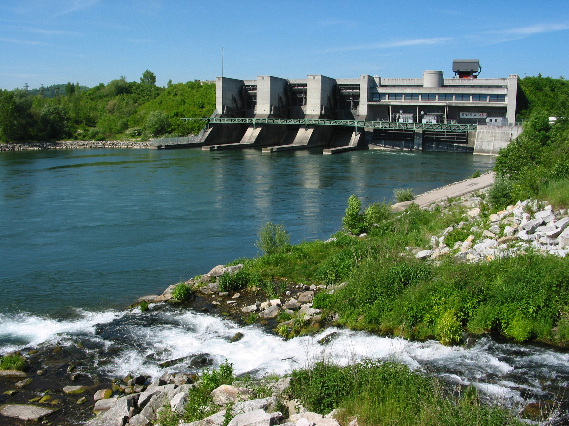 Kraftwerk Marchtrenk